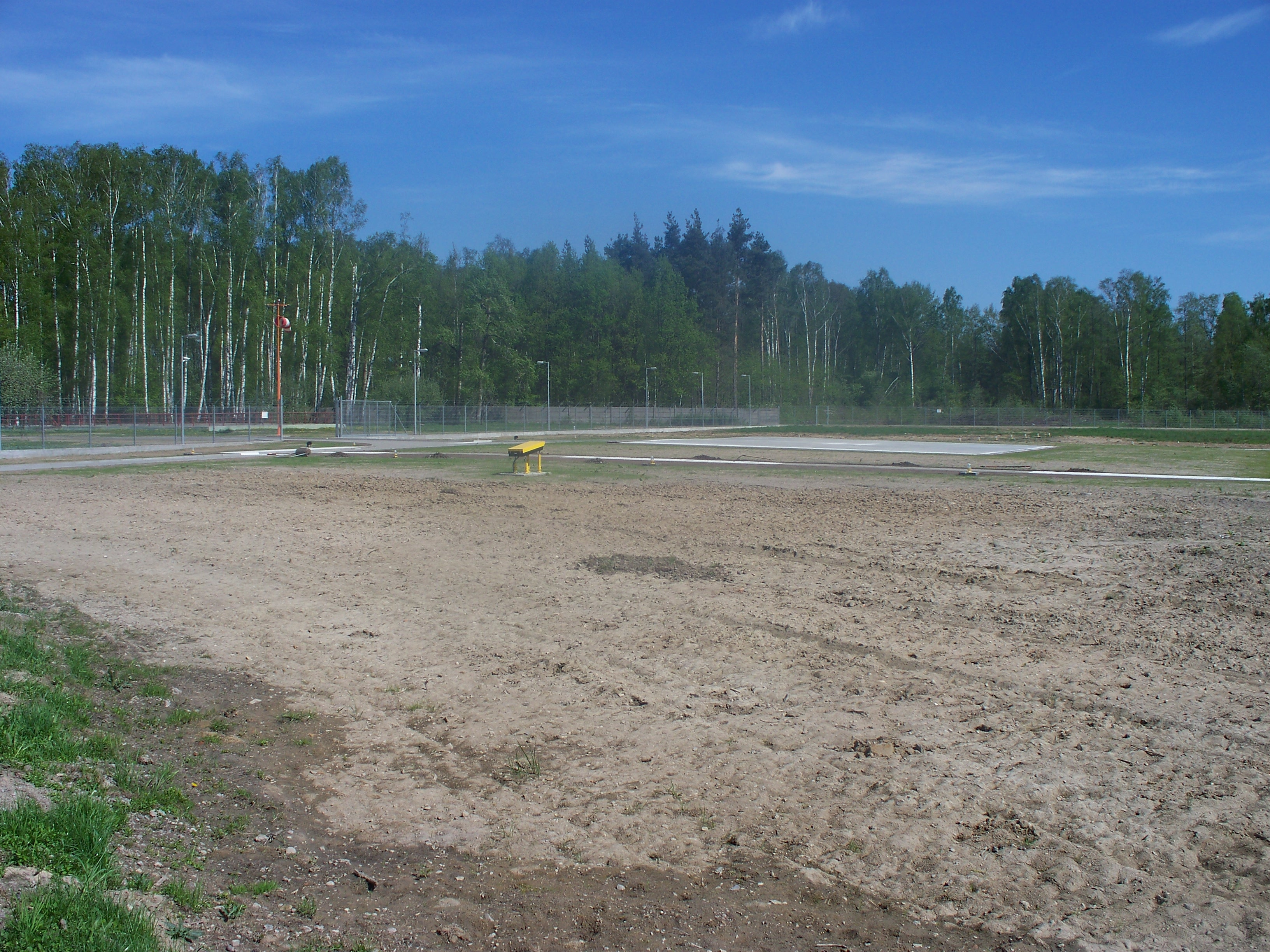 Lądowisko to znajduje się przy Agencji Rezerw Materiałowych - składnicy w Szepietowie przy ul. Przemysłowej 2